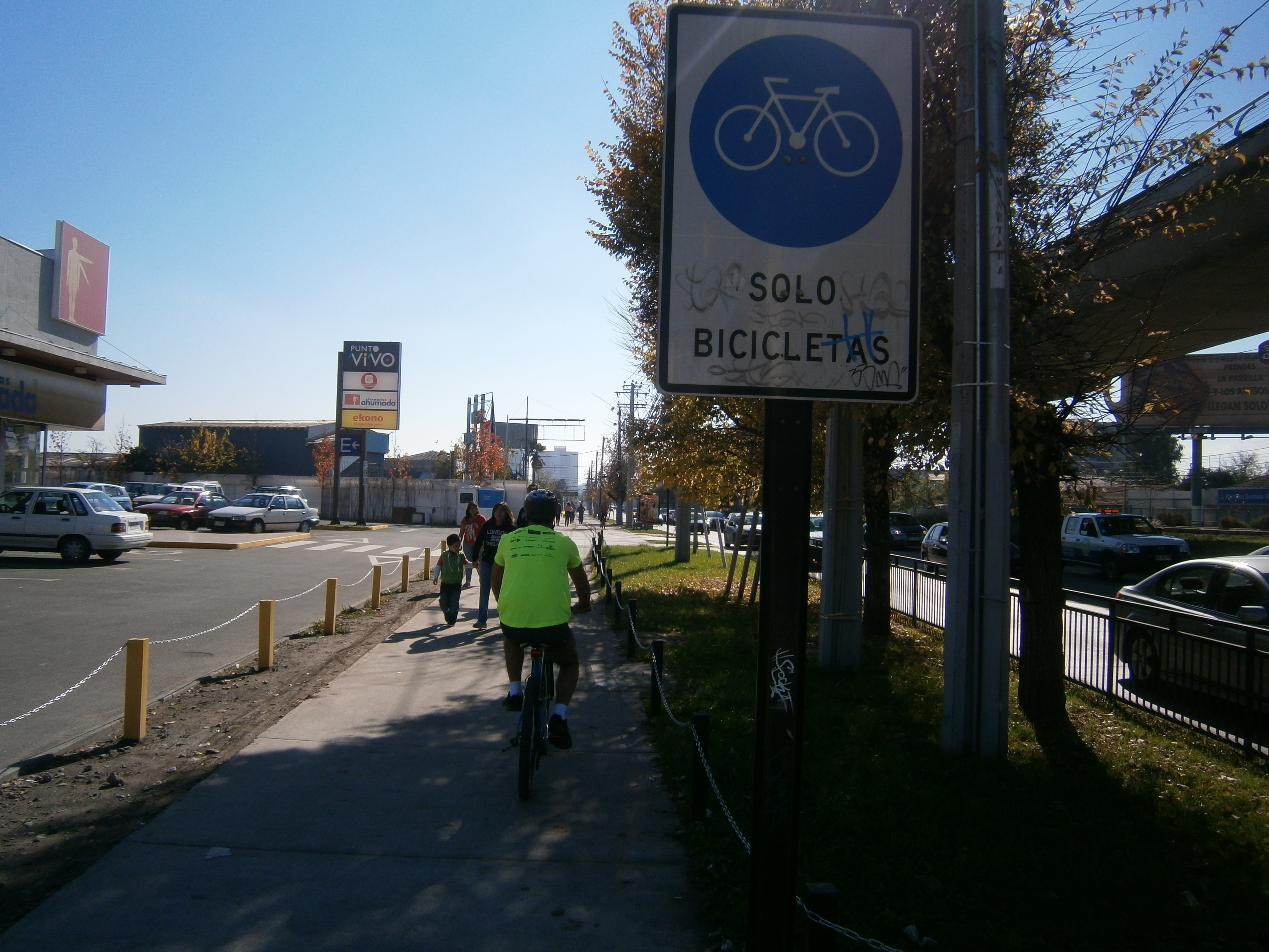 Ciclovía de Vicuña Mackenna fotografiada desde Rojas Magallanes hacia el norte.